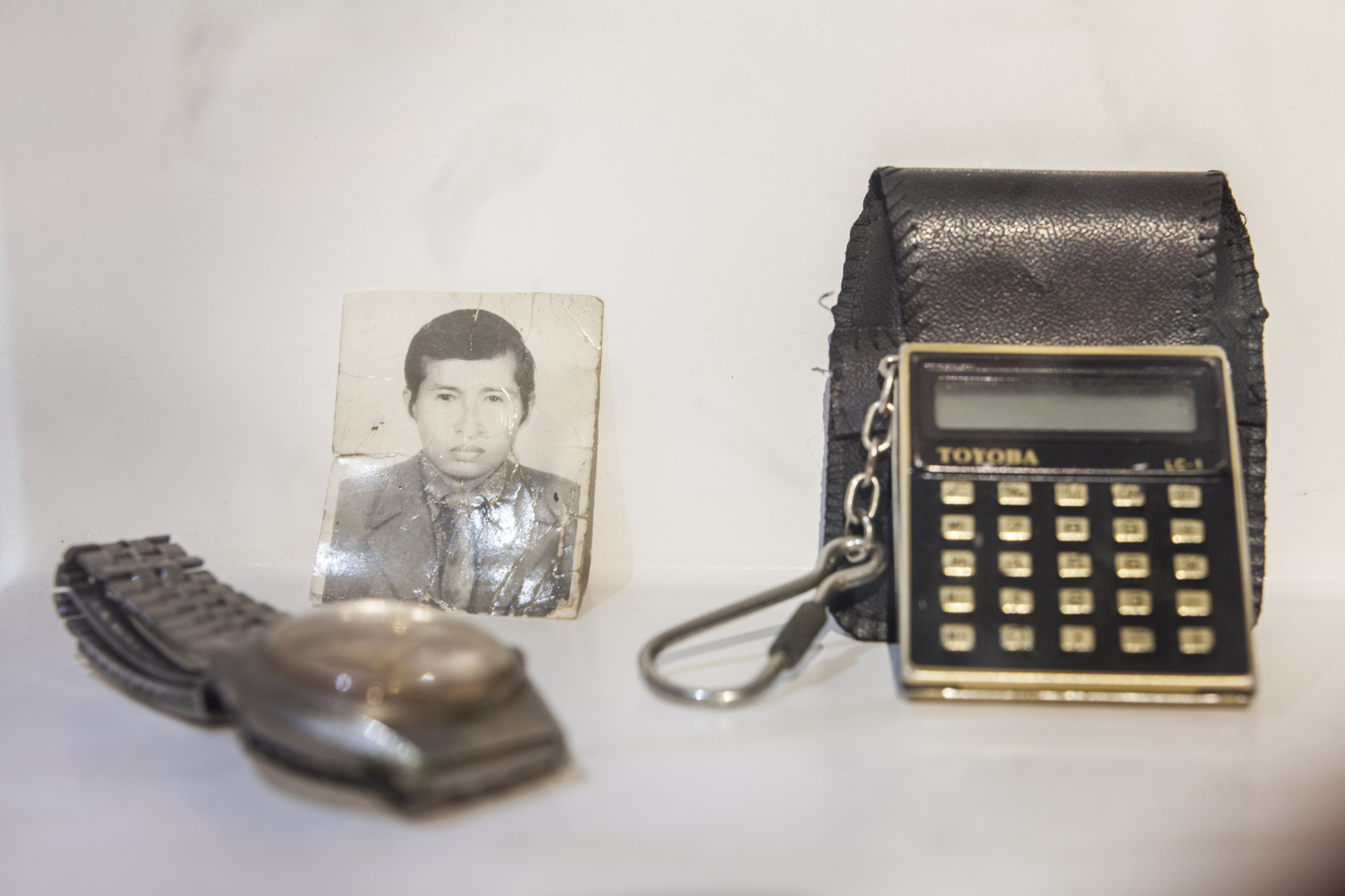 Desapariciones forzadas durante el conflicto armado interno en Perú